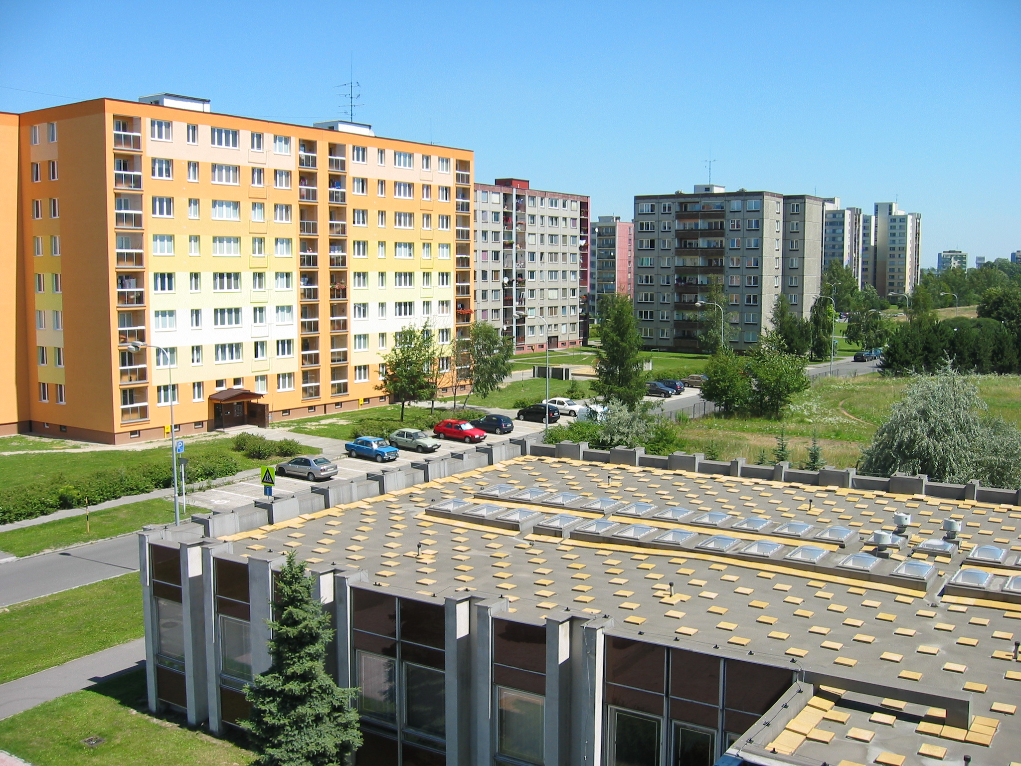 Středoškolská ulice, Ostrava-Zábřeh. Pohled z budovy Střední průmyslové školy chemické. Vlevo nově zrekonstruovaný panelový dům, vpravo správní křídlo SPŠCH.